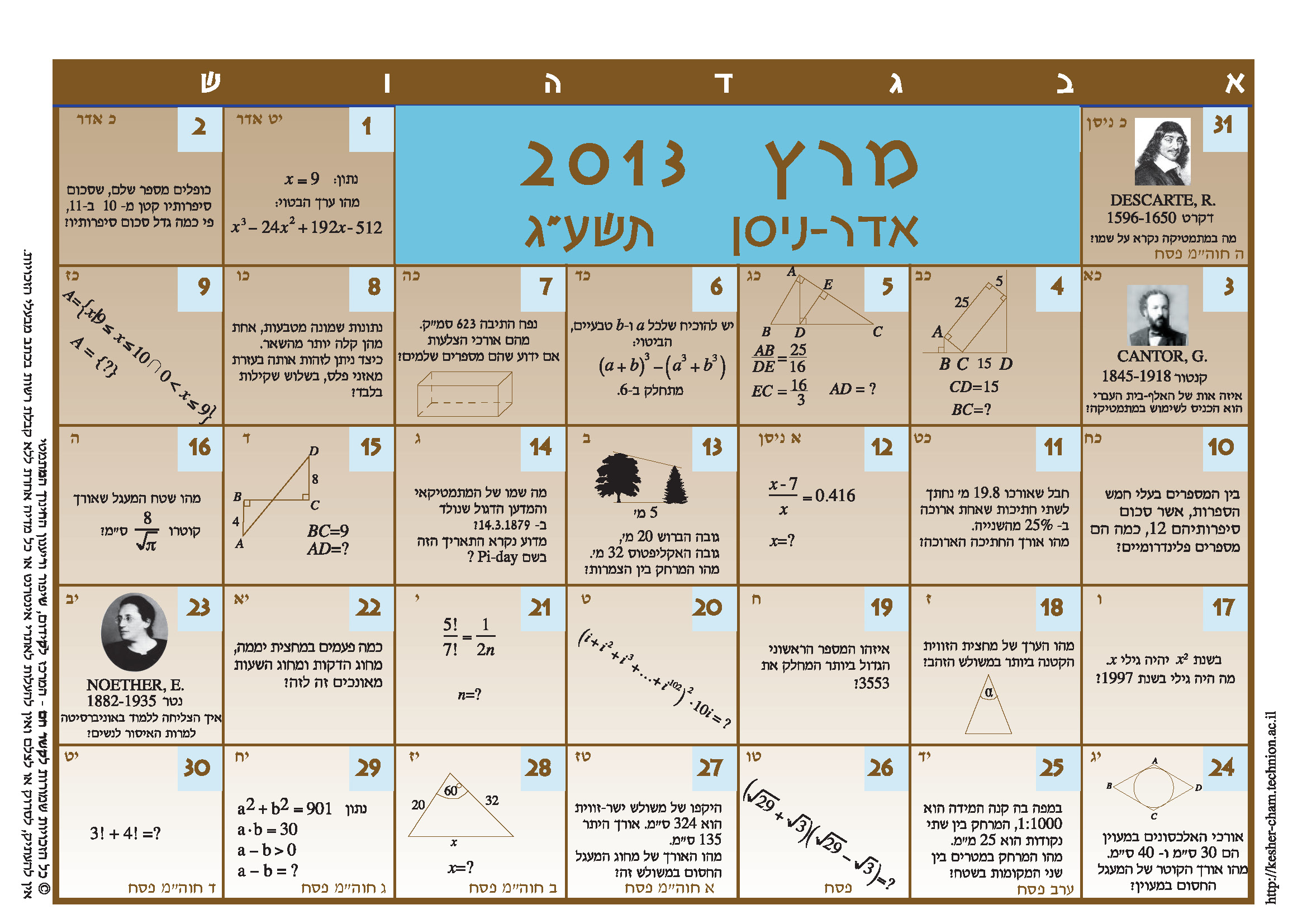 יומיומטיקה תשעג מרץ 2013